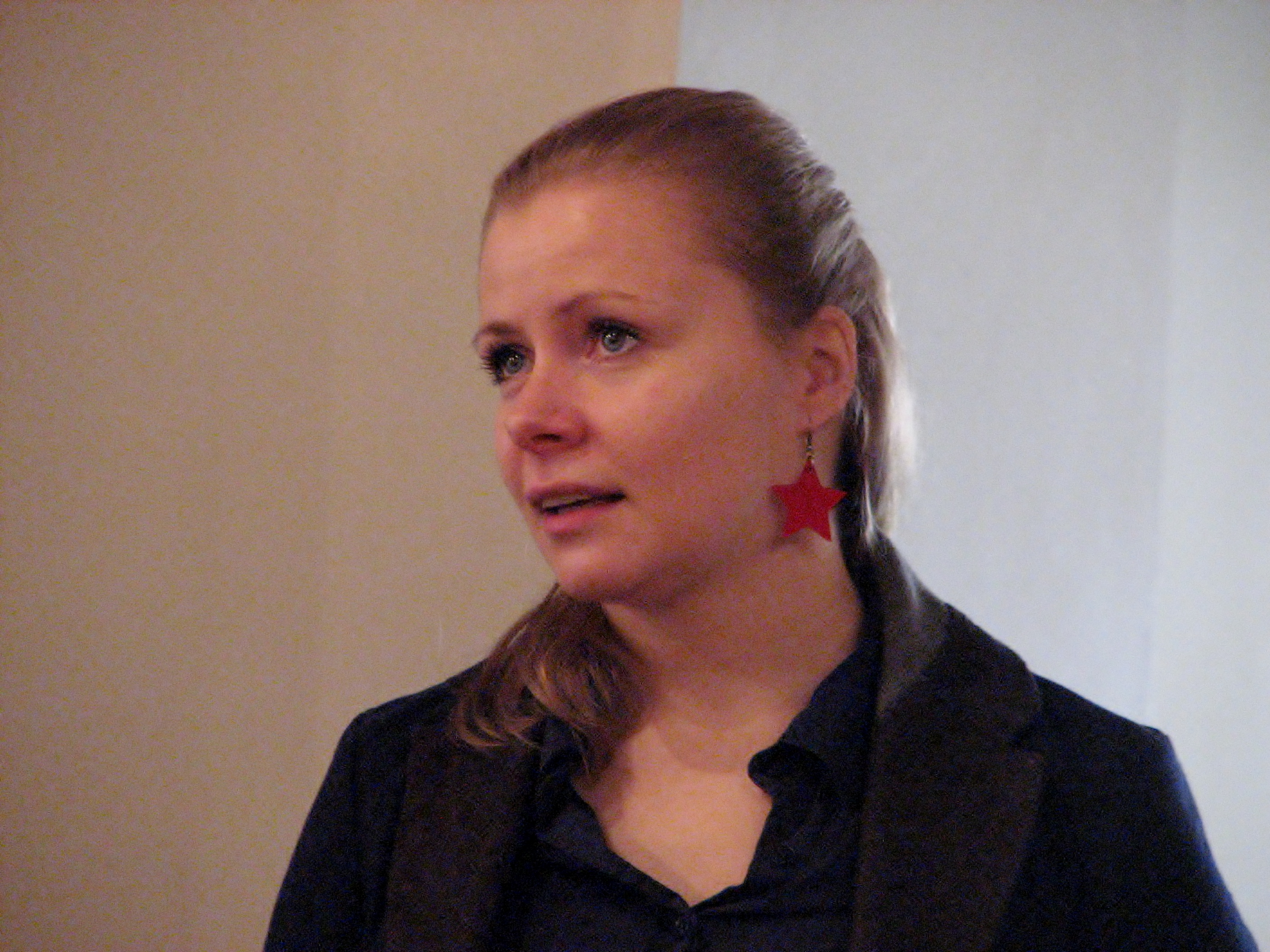 Auri Jürna Eesti Teatriliidus raamatuesitlusel